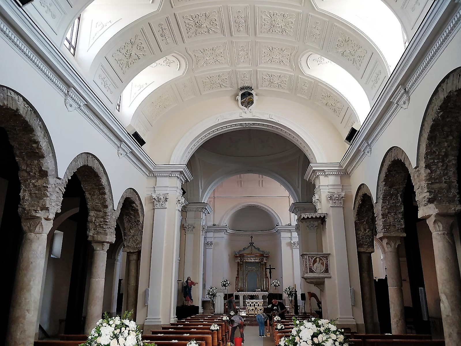 Navata.